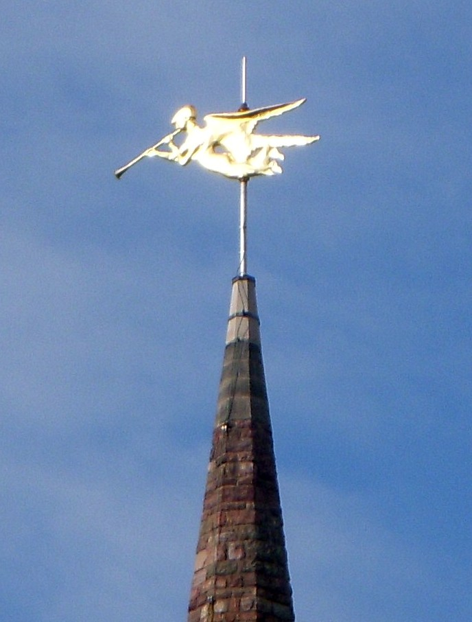 Engelska kyrkan i Diplomatstaden i Stockholm